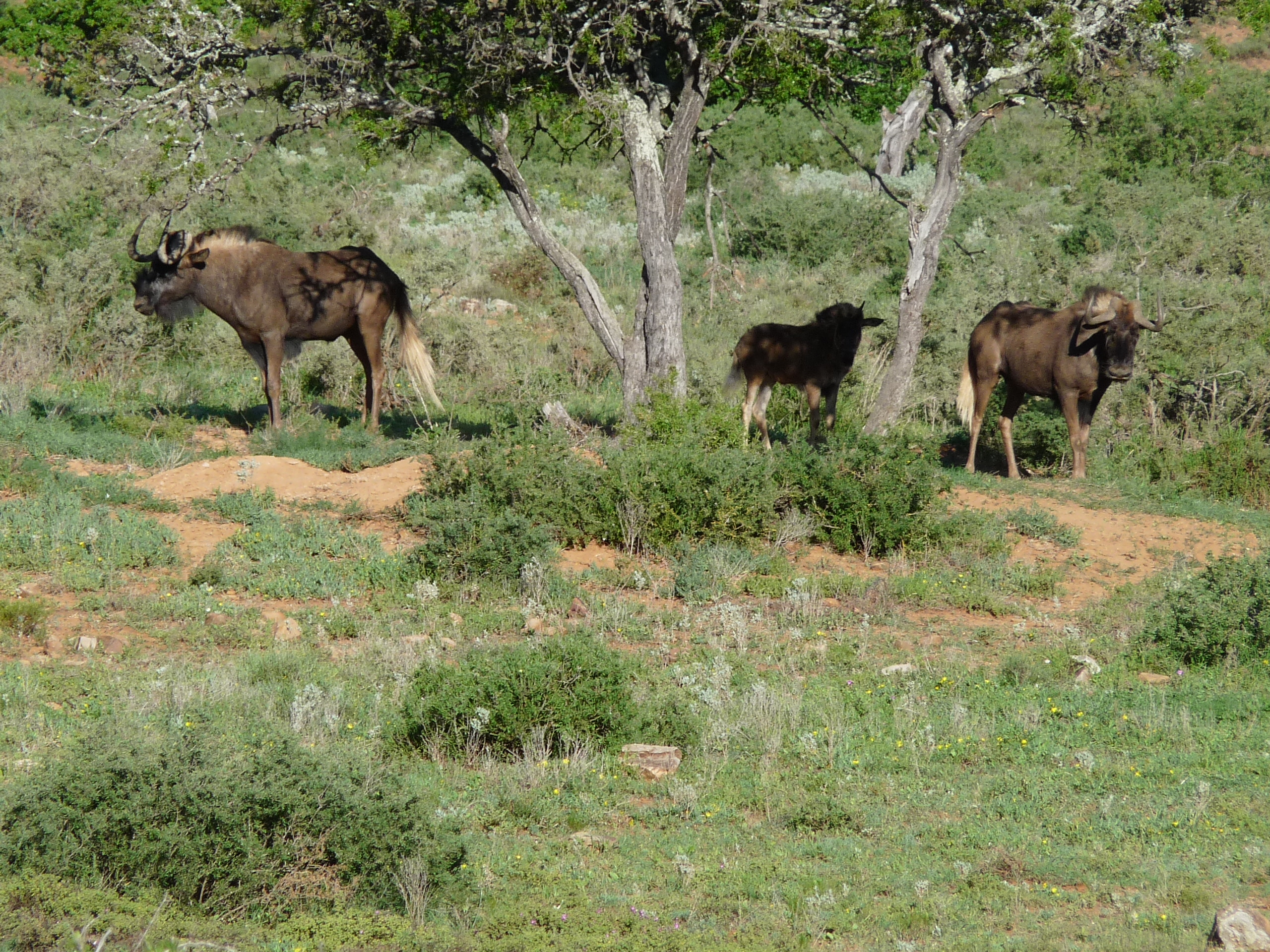 Black Wildebeeste 01